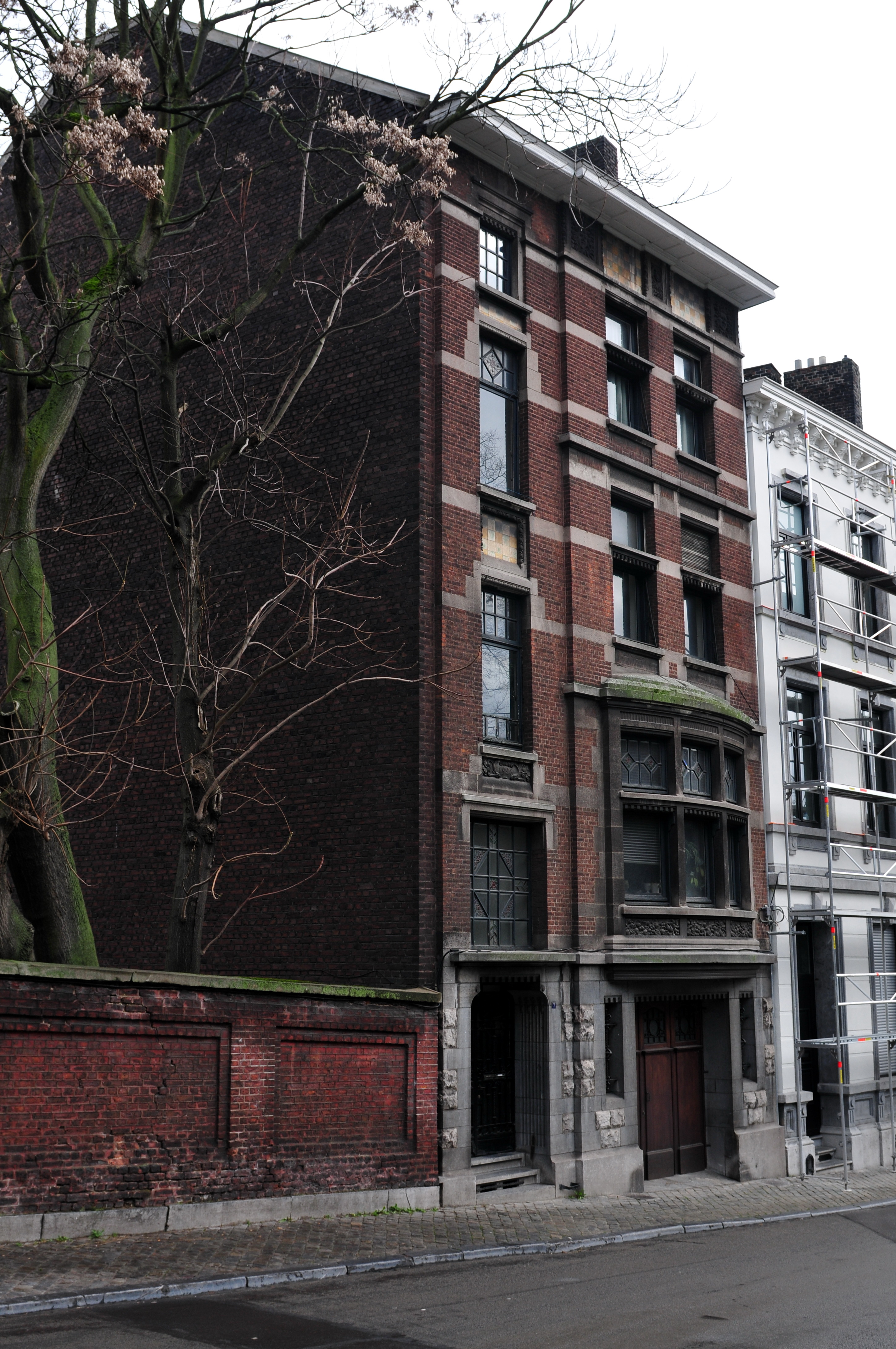 Lüttich